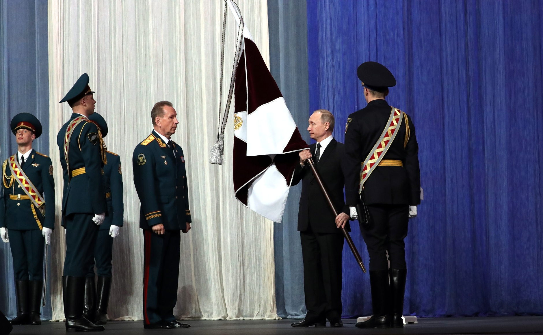 Церемония вручения знамени войск национальной гвардии Президентом России Владимиром Путиным